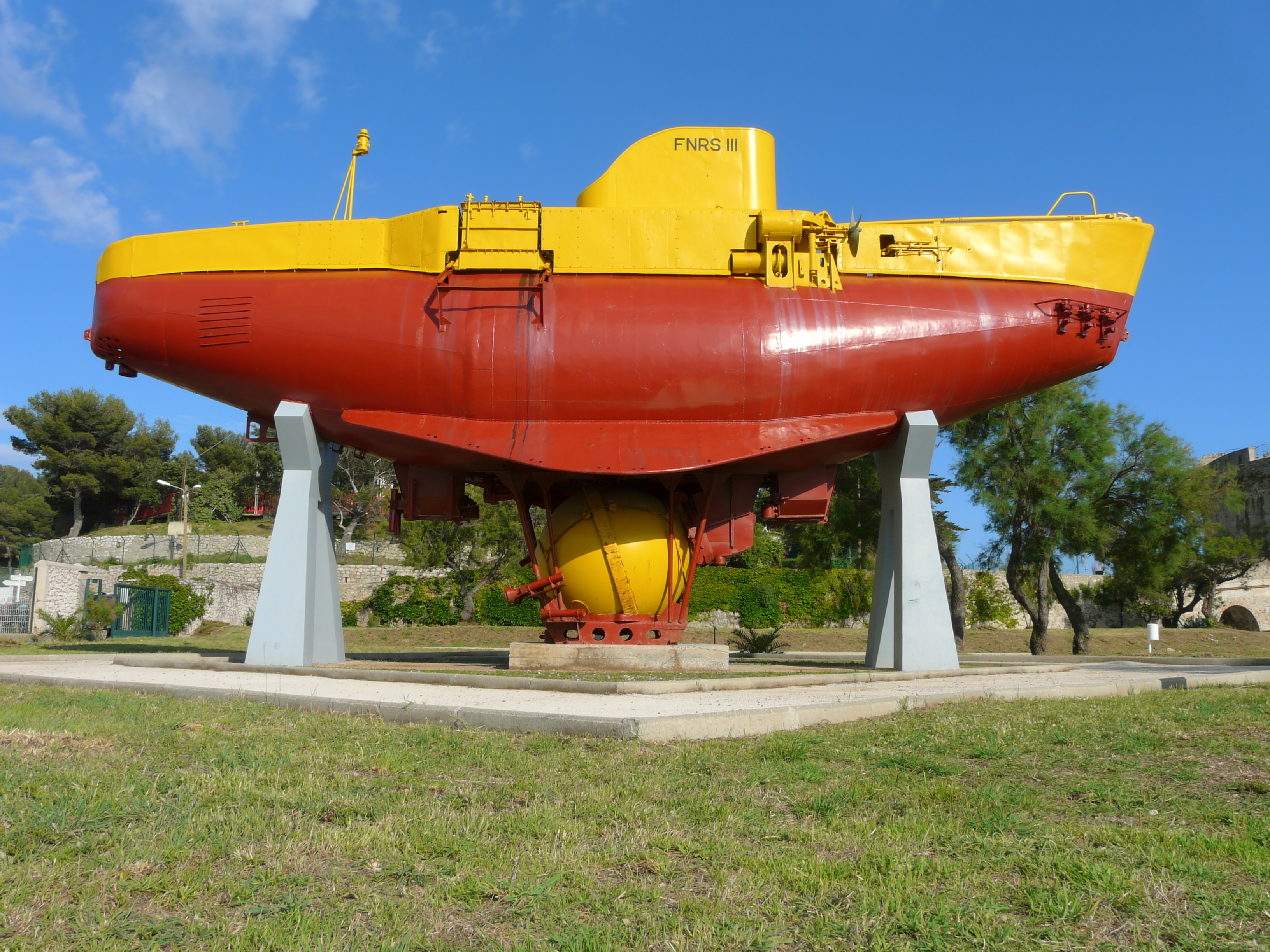 Le FRNS III exposé au Mourillon, à Toulon. Coté Est.